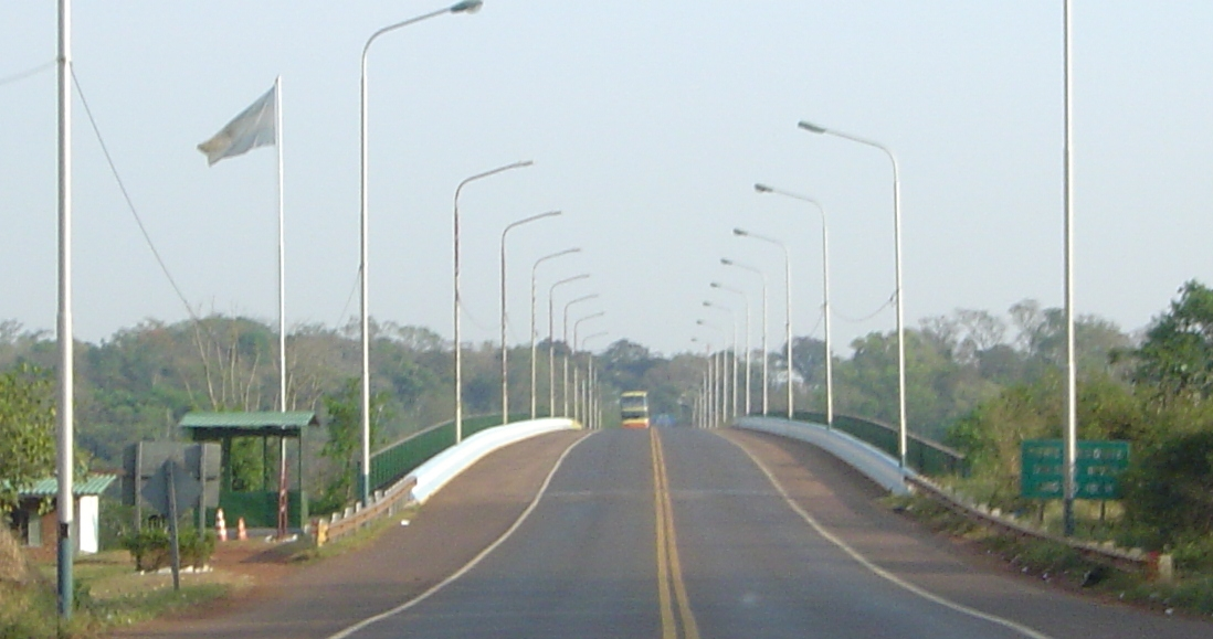 Puente Internacional Tancredo Neves, entre Brasil y la Argentina.